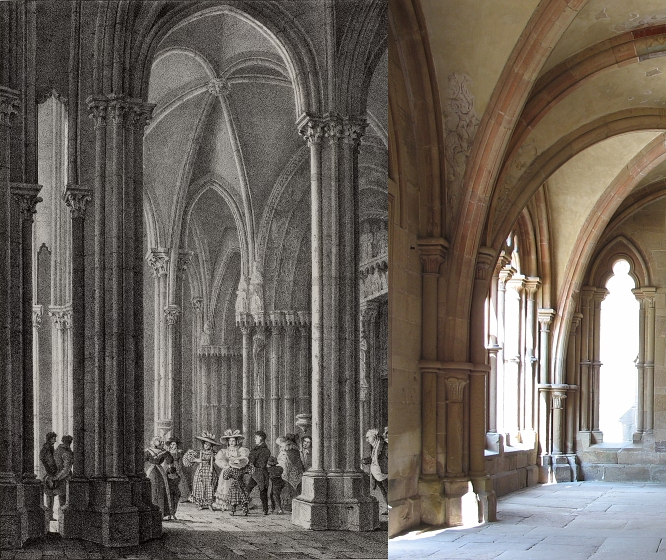 Vorhallen von Norte Dame de Dijon und Maulbronn im Vergleich